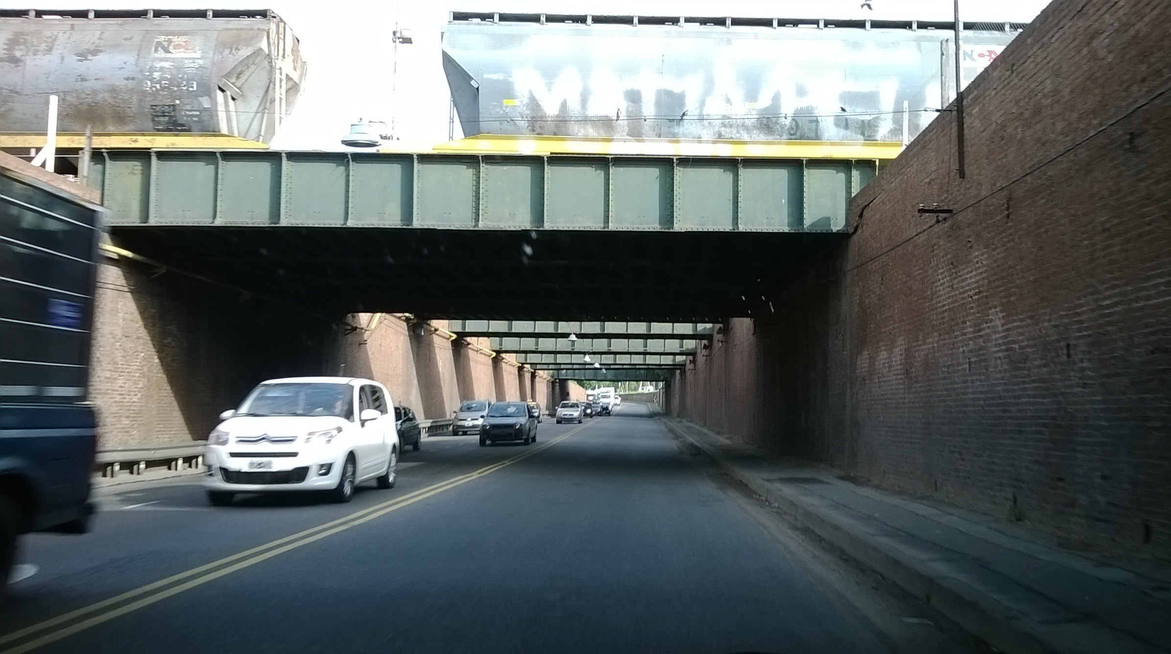 Pasaje Celedonio Escalada, Rosario, Argentina.